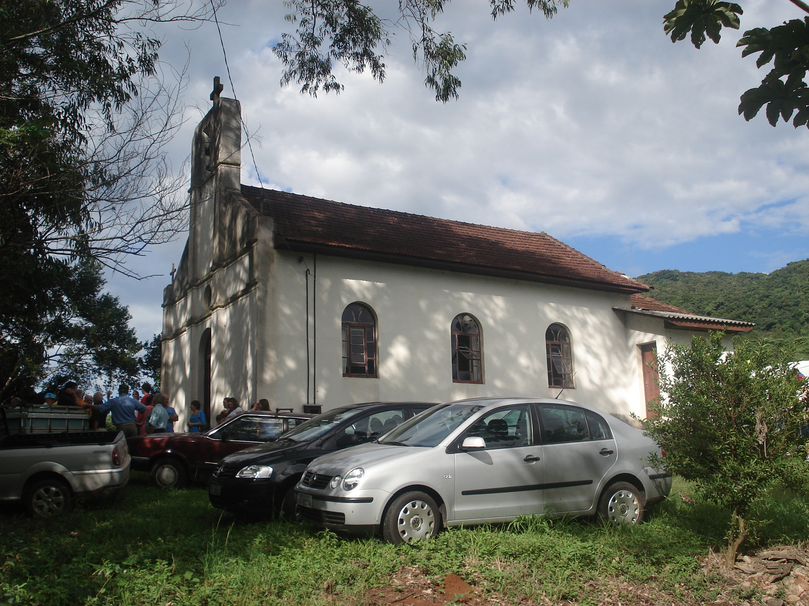 Capela Católica da localidade de Voluntária em Igrejinha em dia de missa.